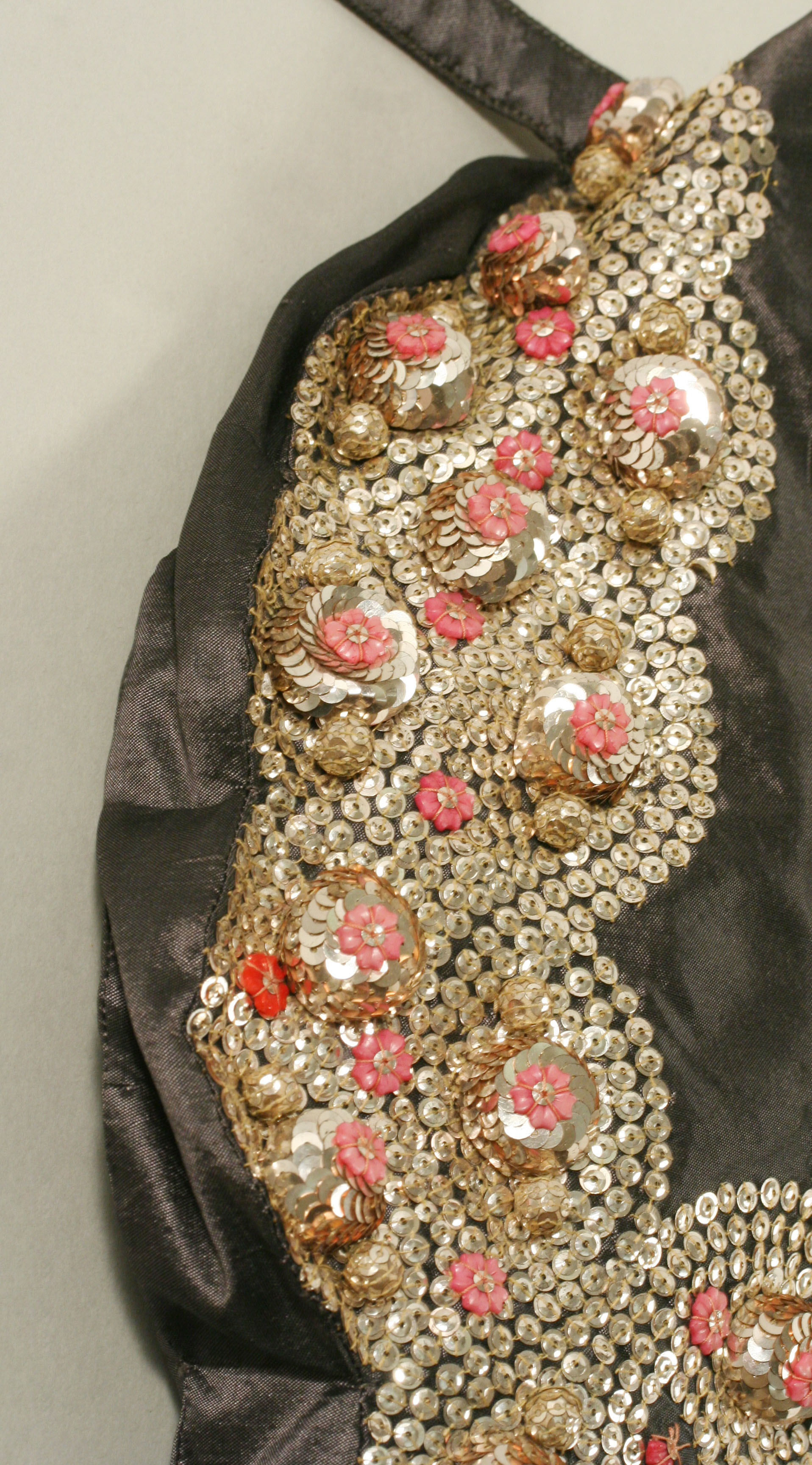 French; Evening dress